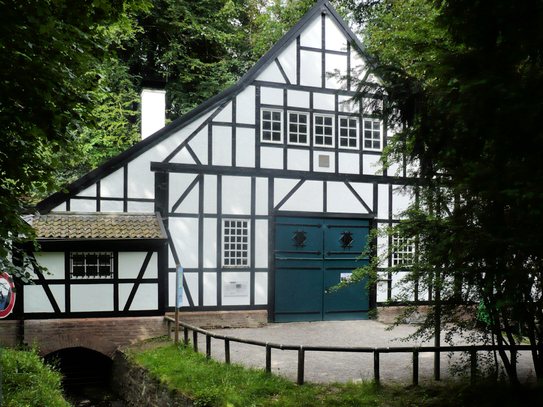 Halbachhammer in Essen